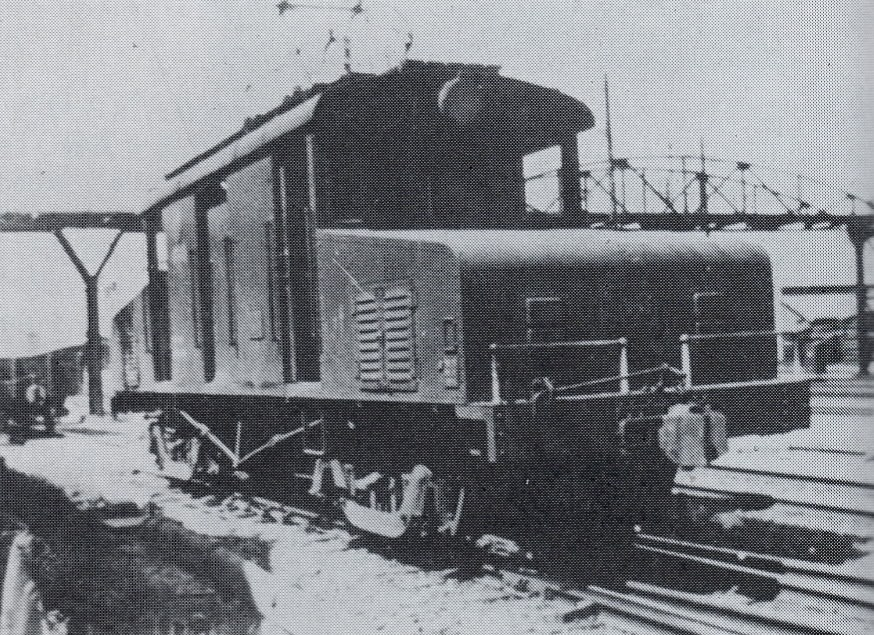 名鉄デキ100形。